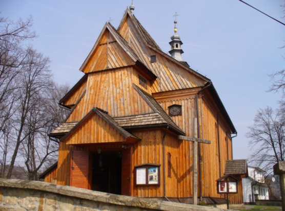 Raciechowice, parafia rzymskokatolicka pw. Św. Jakuba Apostoła